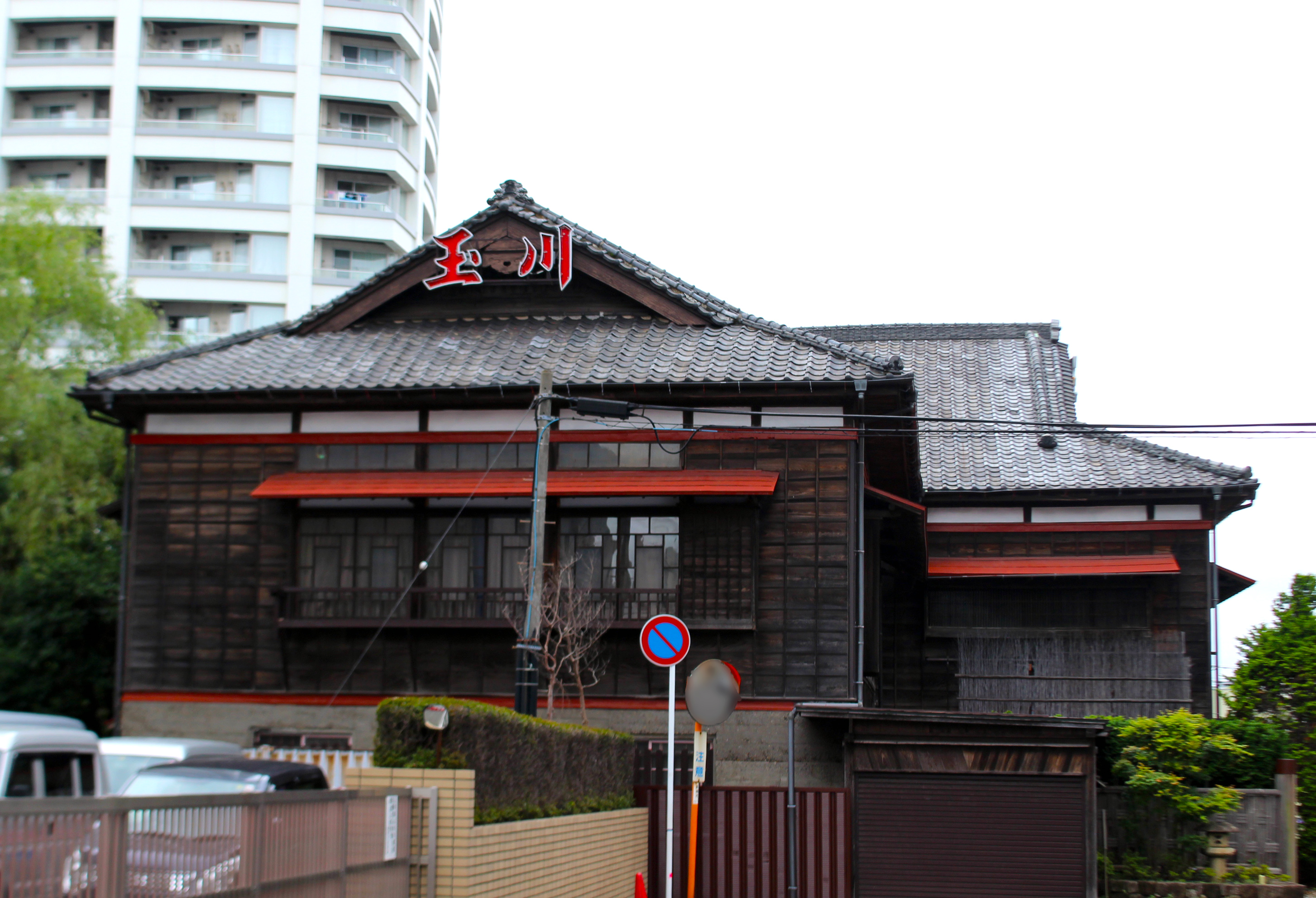 Tamagawa Ryokan 20190708